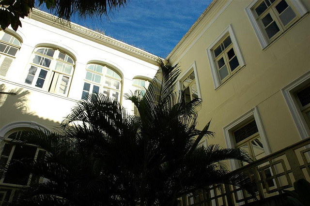 MAE-UFBA